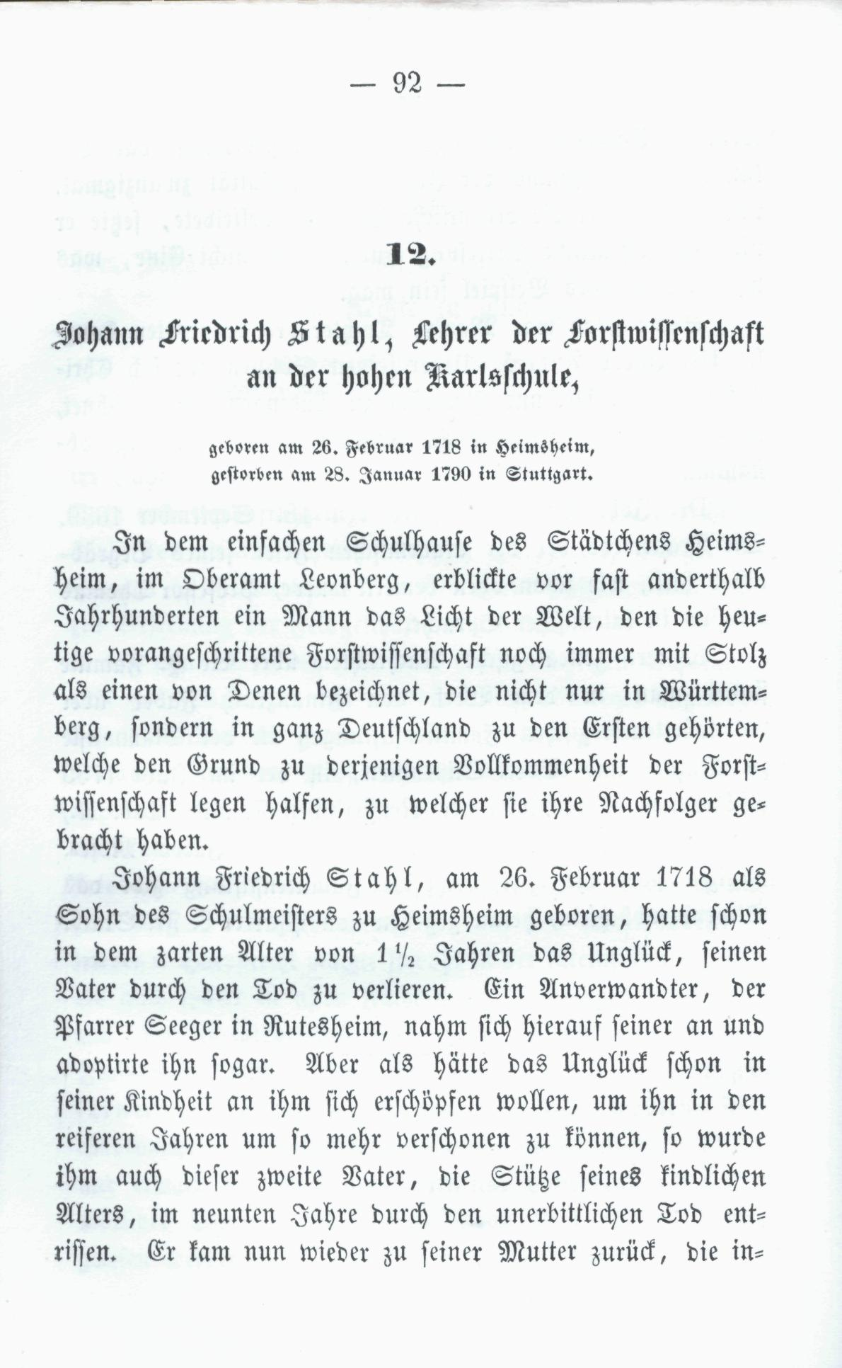 Württembergischer Bildersaal, eine Sammlung von Württembergs Berühmtheiten aus Alter und neuer Zeit, Erster Band, Stuttgart 1859